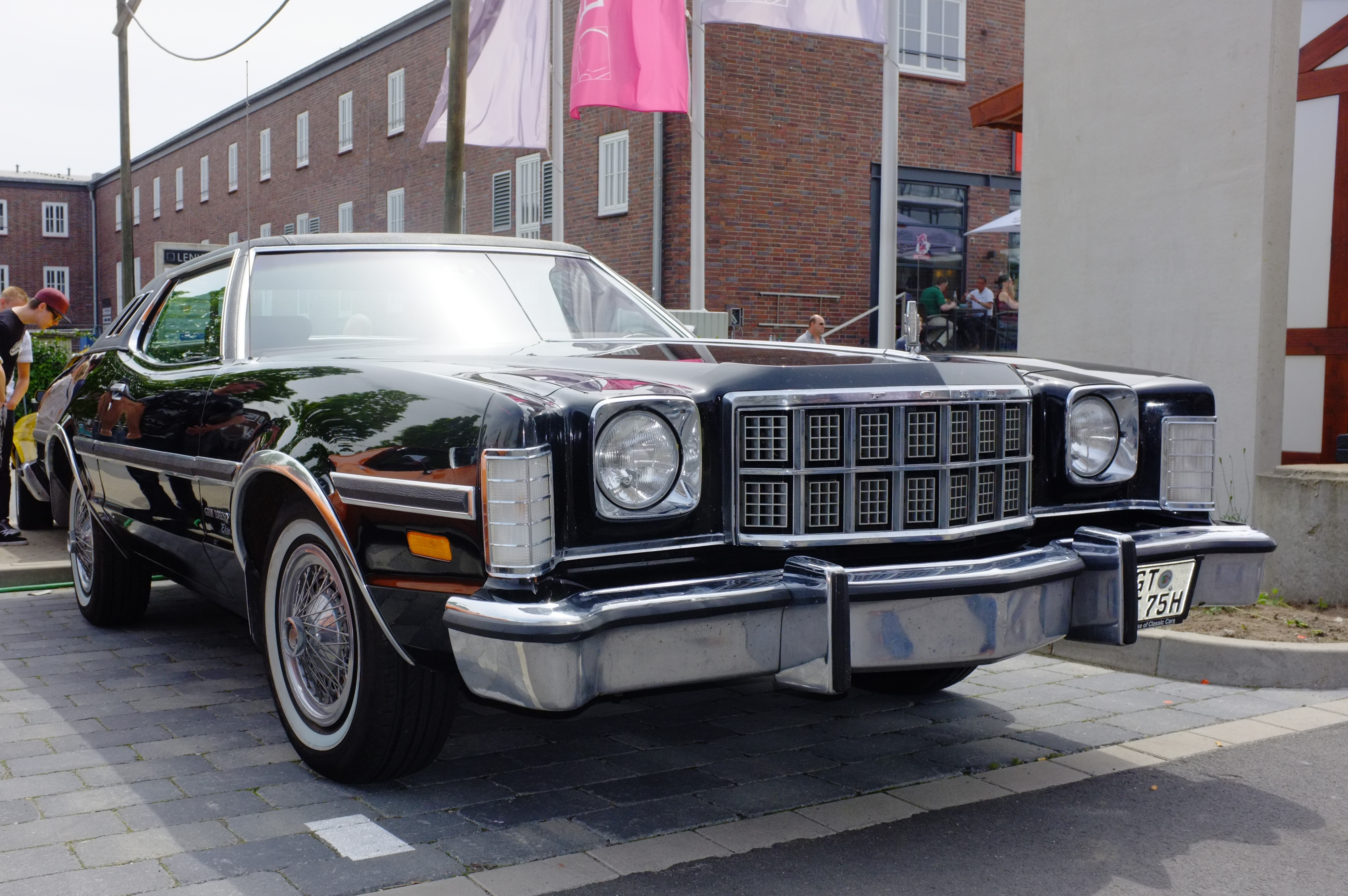 US-Car Treffen, Lenkwerk Bielefeld 2015